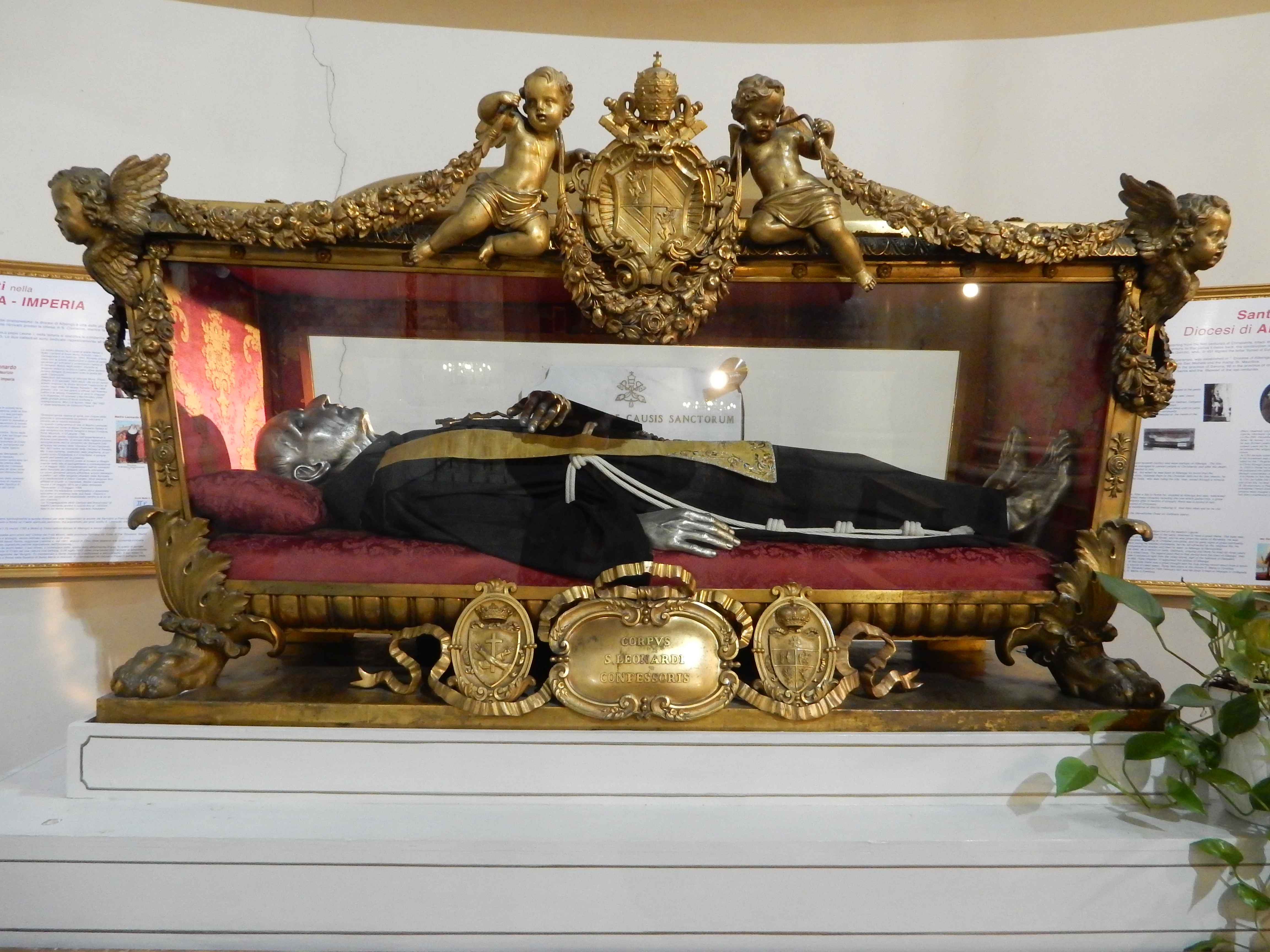 Imperia Porto Maurizio, basilique Saint-Maurice. Reliques de saint Léonard confesseur